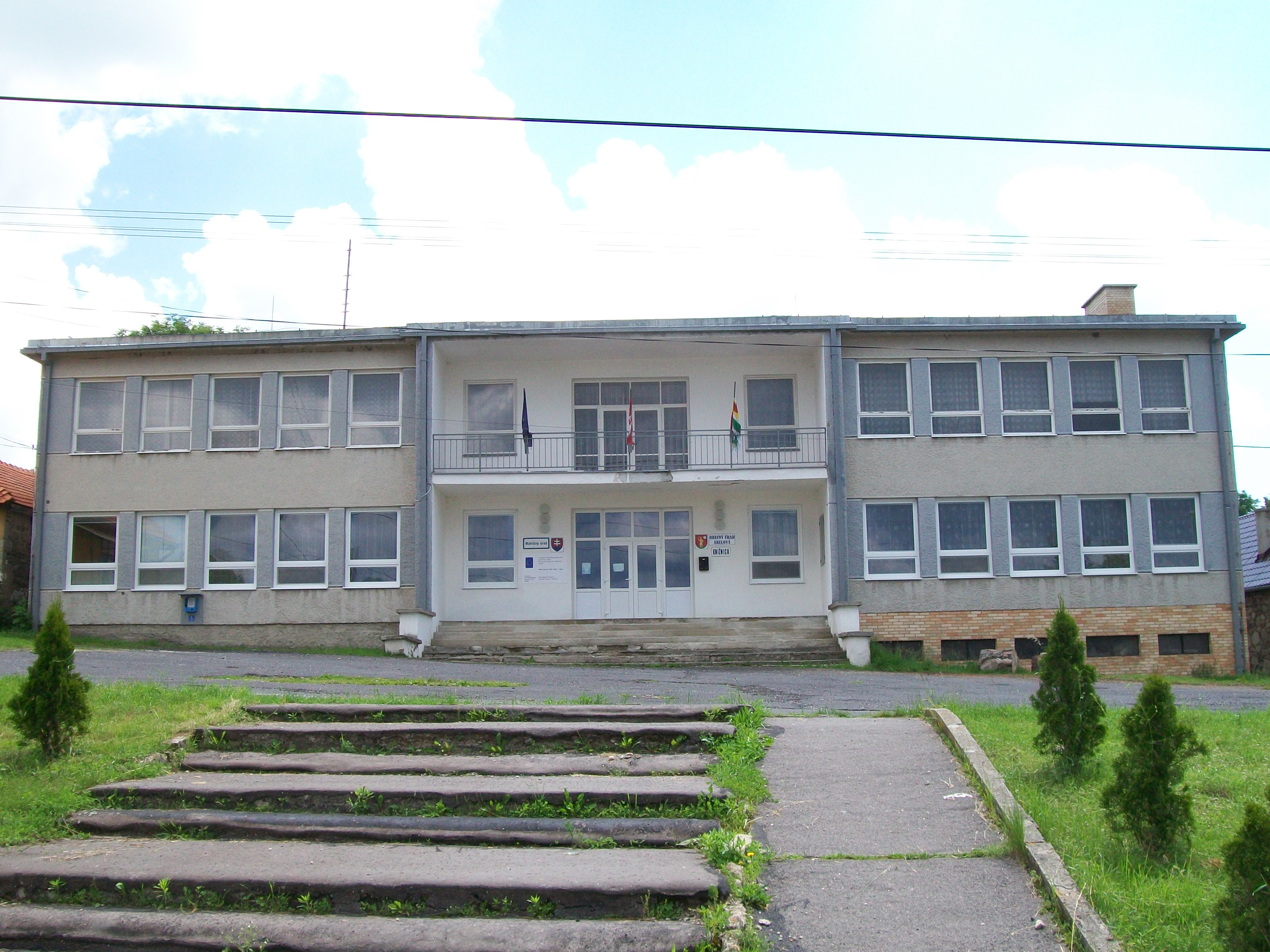 Obecný úrad v obci Ábelová